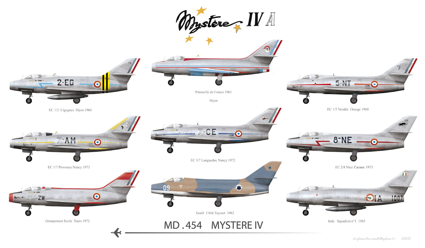 Dassault MD 454 Mystere IV France inde Israël